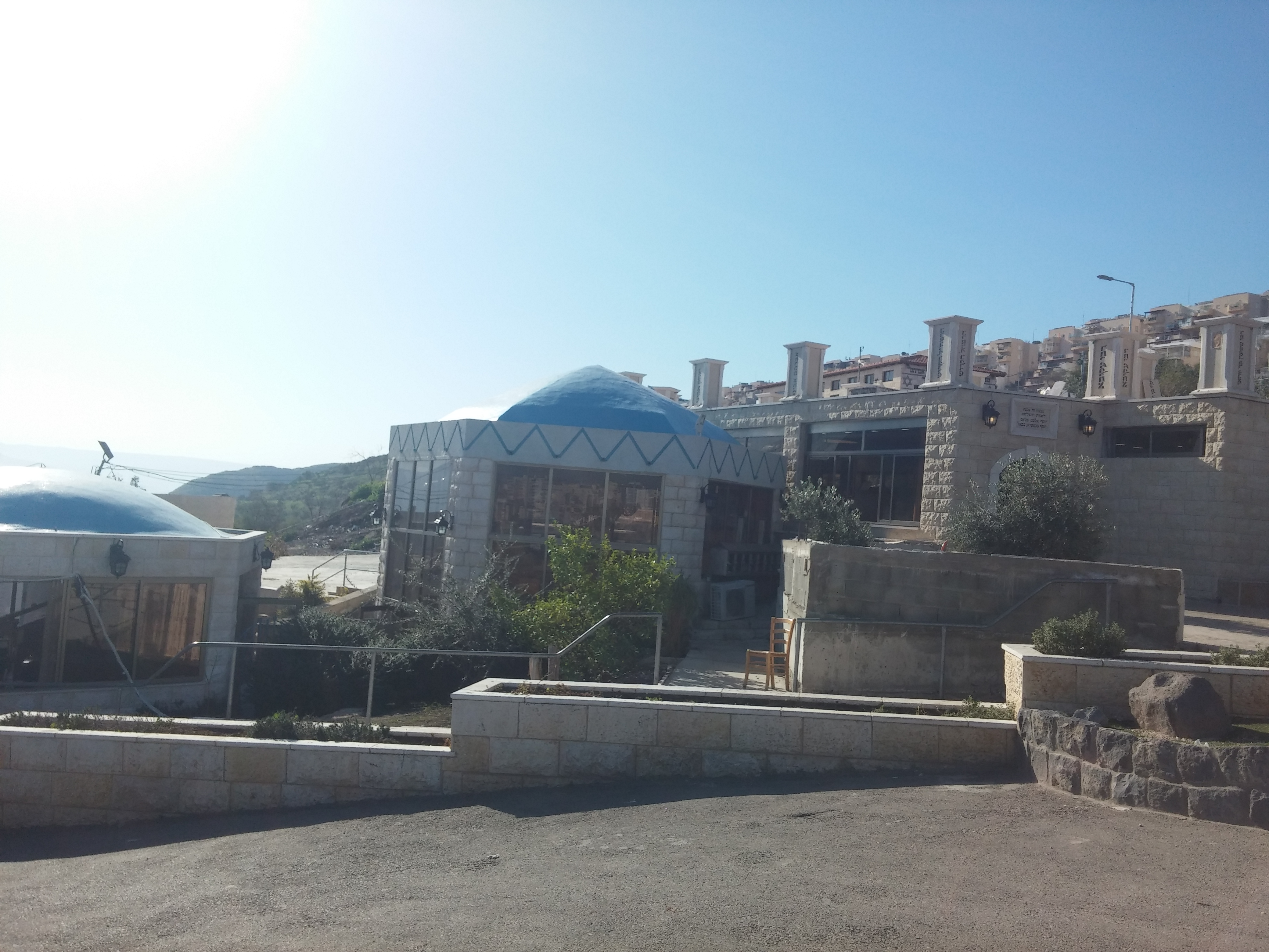 Photoes by Dr. Anat Avital קברי רבי עקיבא והרמח"ל טבריה עילית